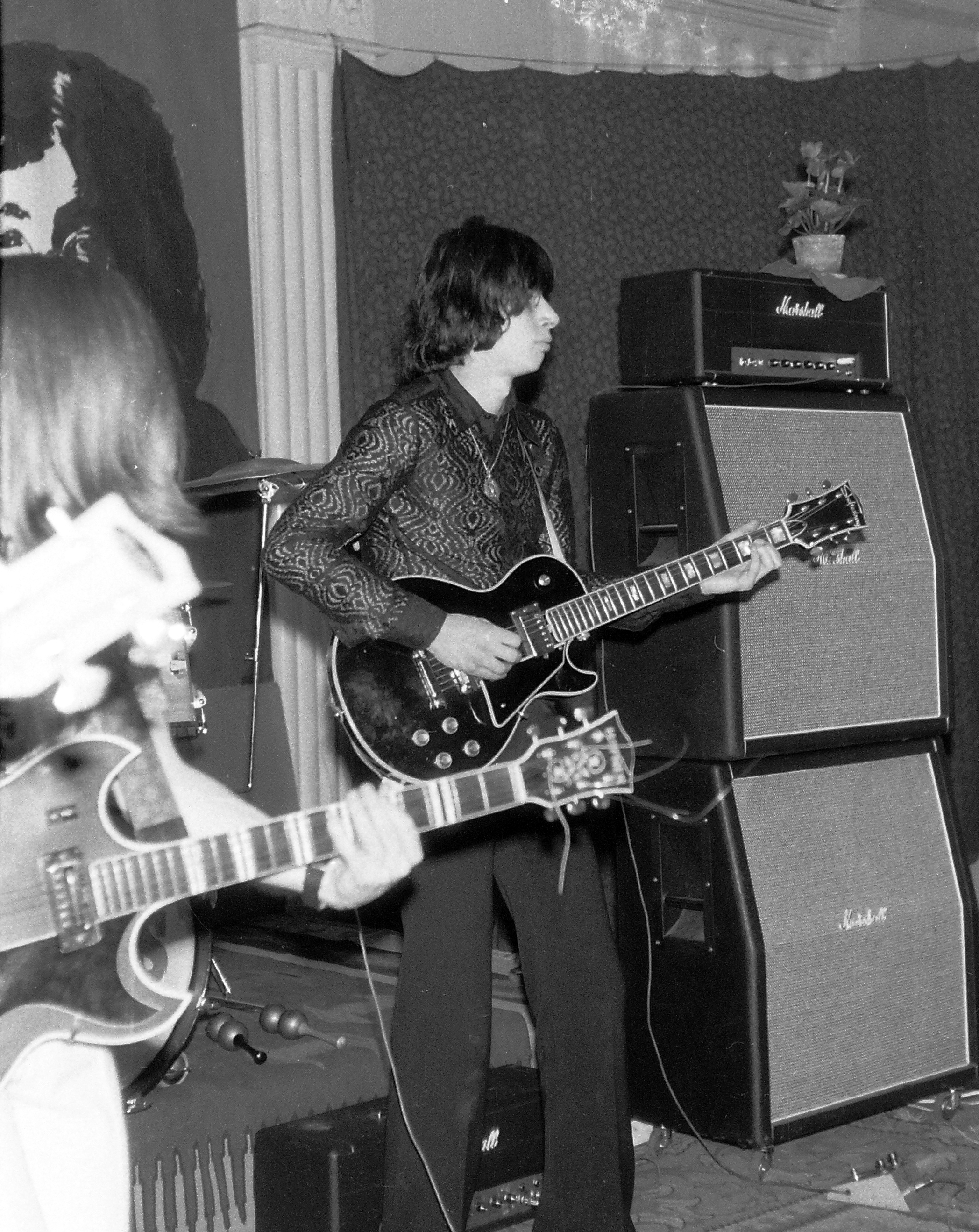 Bródy János Kristóf (Budapest, 1946. április 5. –) Kossuth-díjas és Liszt Ferenc-díjas magyar énekes, gitáros, zeneszerző, szövegíró. Ismeretlen helyen zenél.